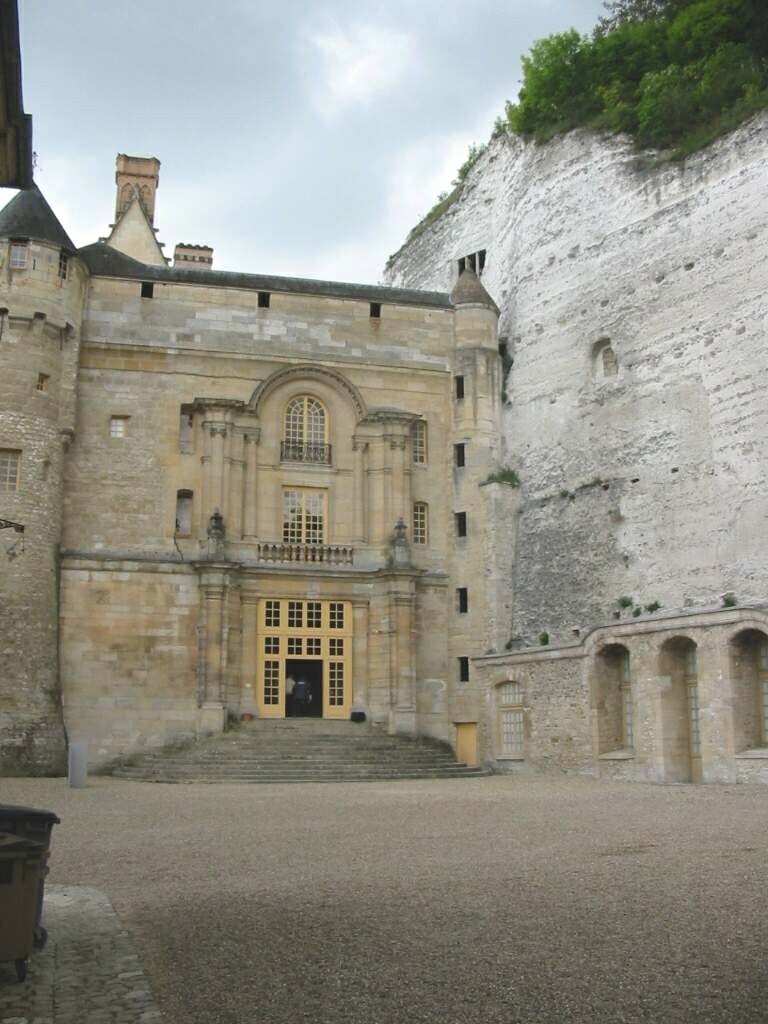 Château de la Roche-Guyon, Val-d'Oise (France) - entrée monumentale et falaise